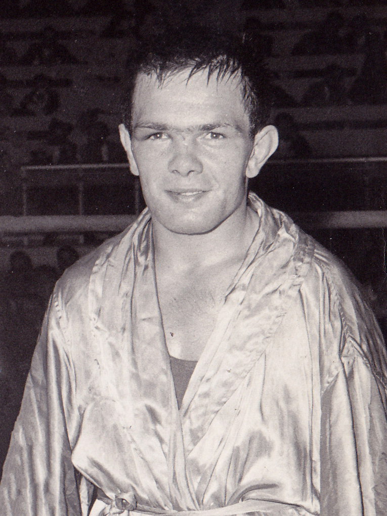 Primo Zamparini, 1960 Olympics